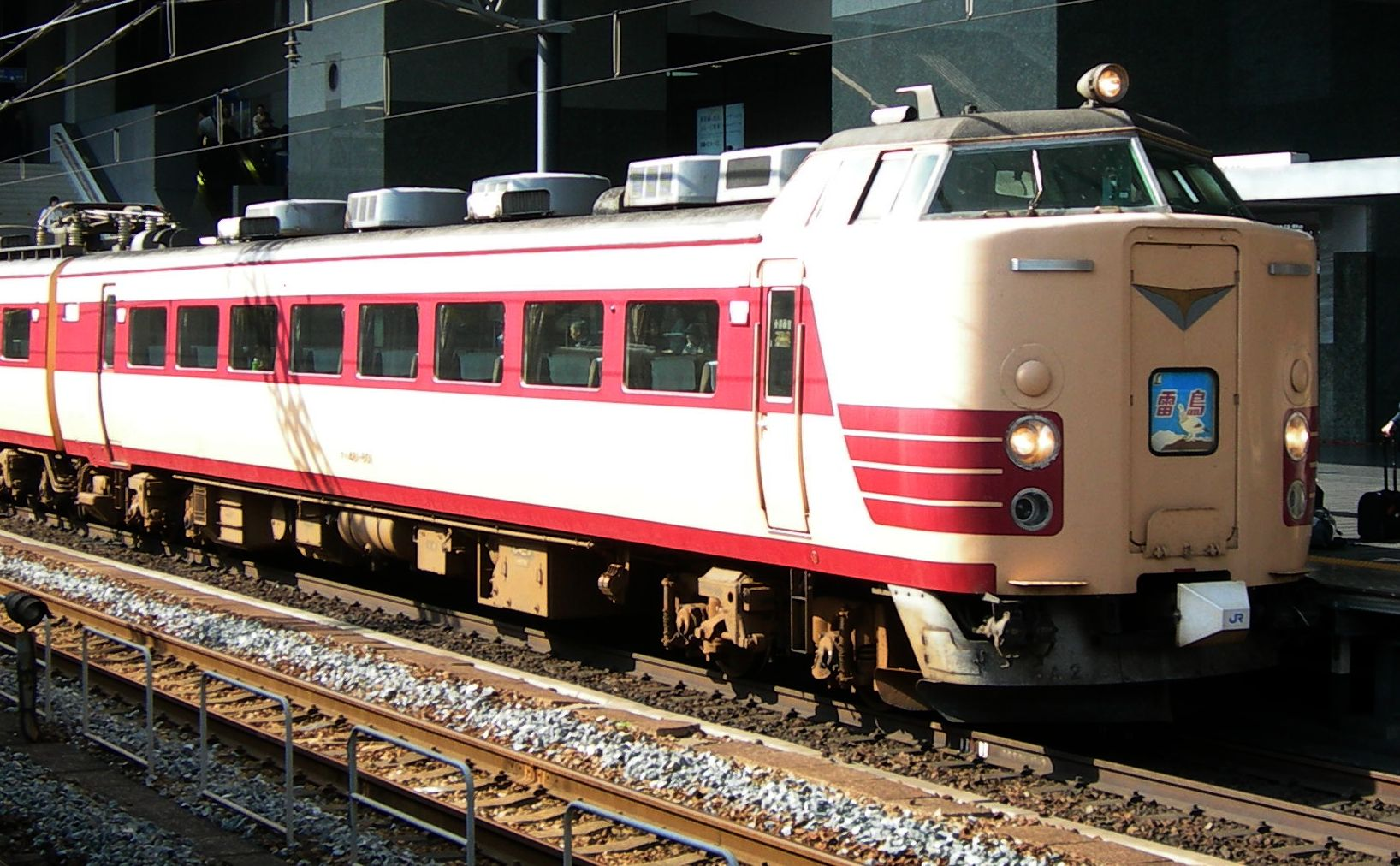 国鉄485系電車